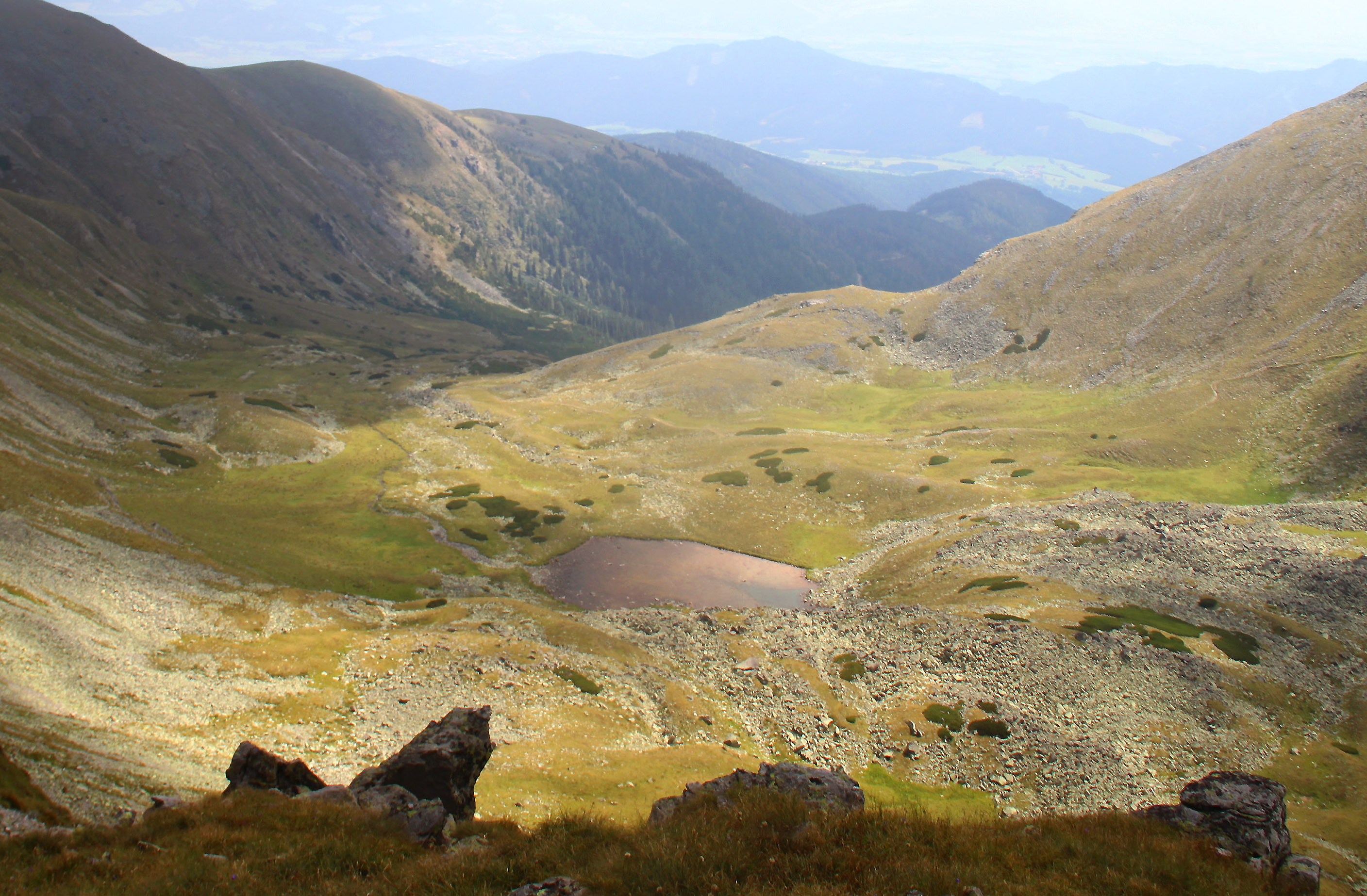 Goldlacke von Norden, im Hintergrund das Aichfeld